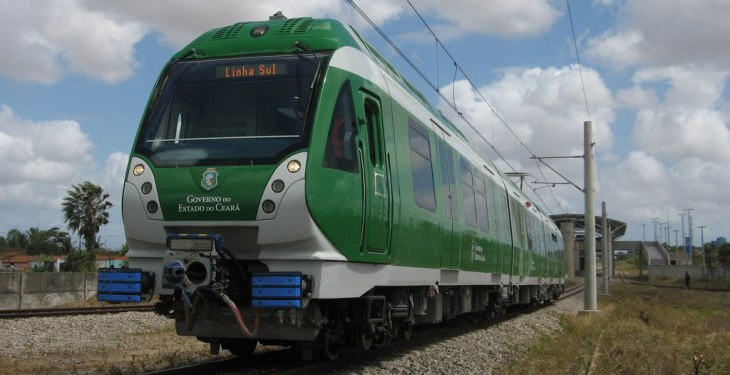 TUE Elettrotreno ETR 200 fabricado pela AnsaldoBreda, na Linha sul do Metrô de Fortaleza, no Ceará.